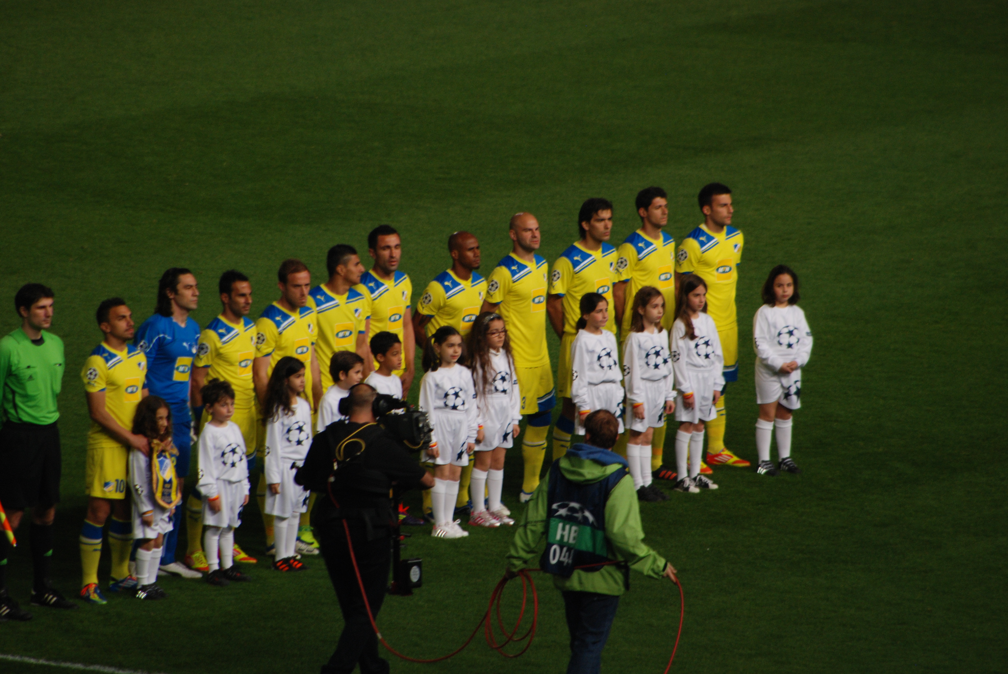 APOEL - real madrid